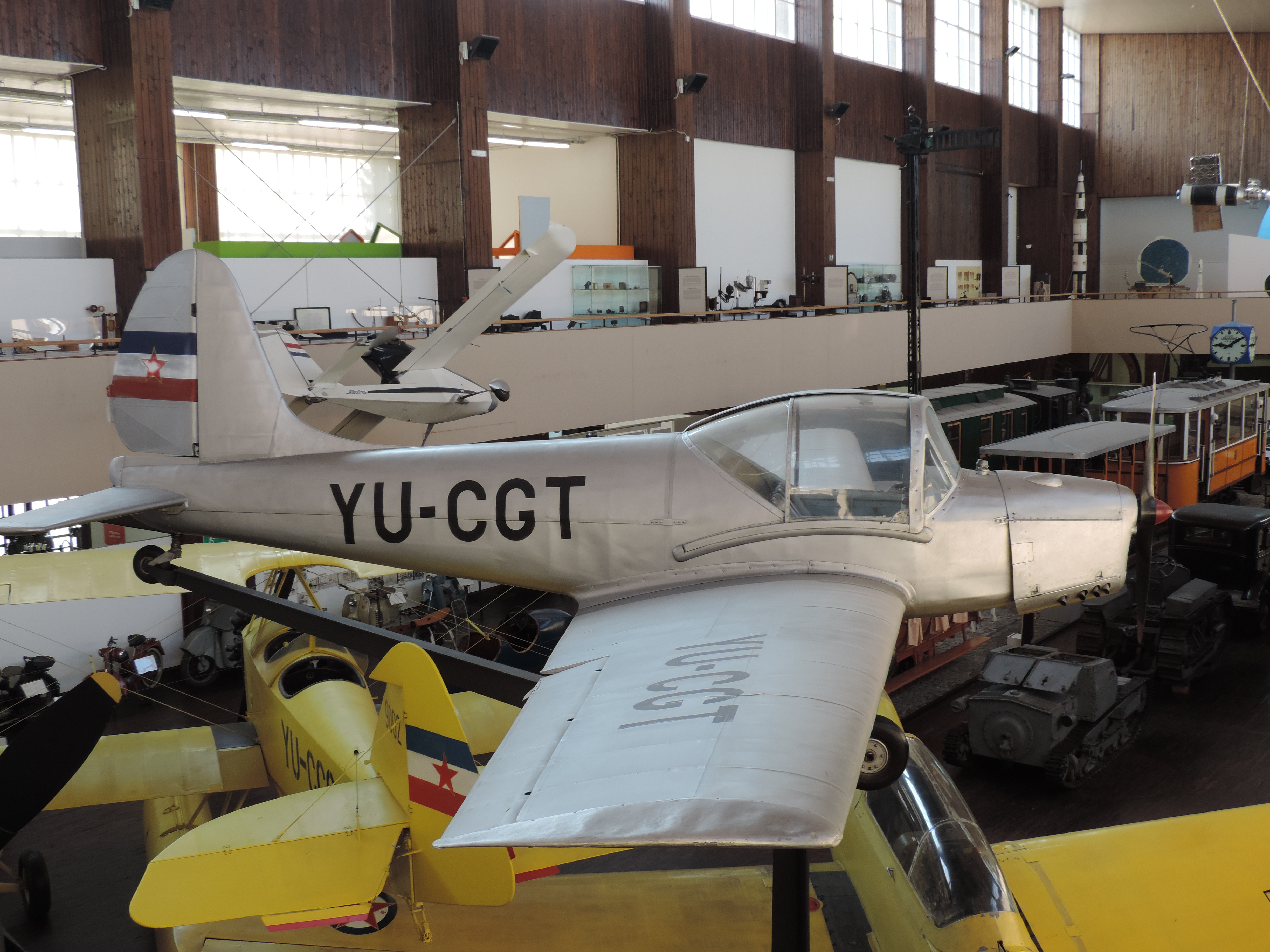 Utva C-3 Trojka im Tehnicki Muzej Zagreb